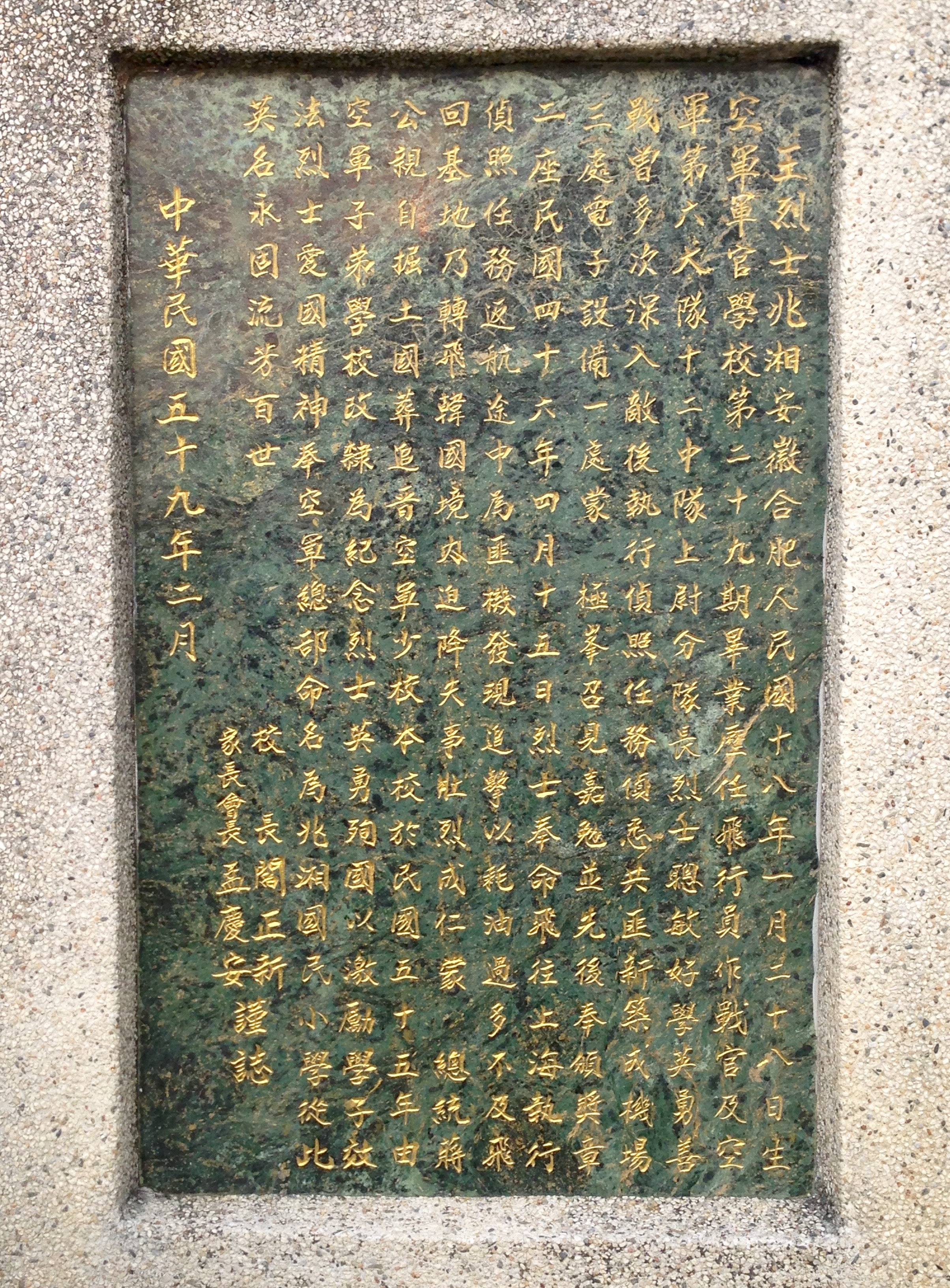 中文（台灣）: 王兆湘銅像碑文